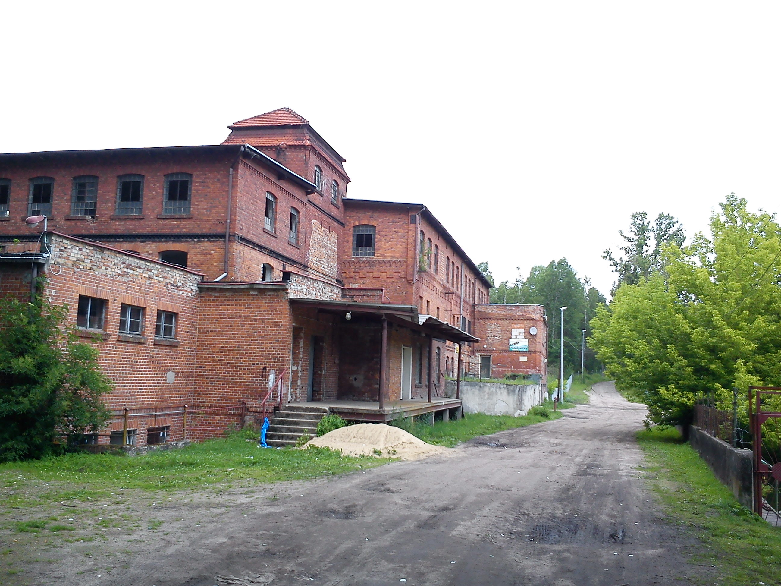 Koziczyn.